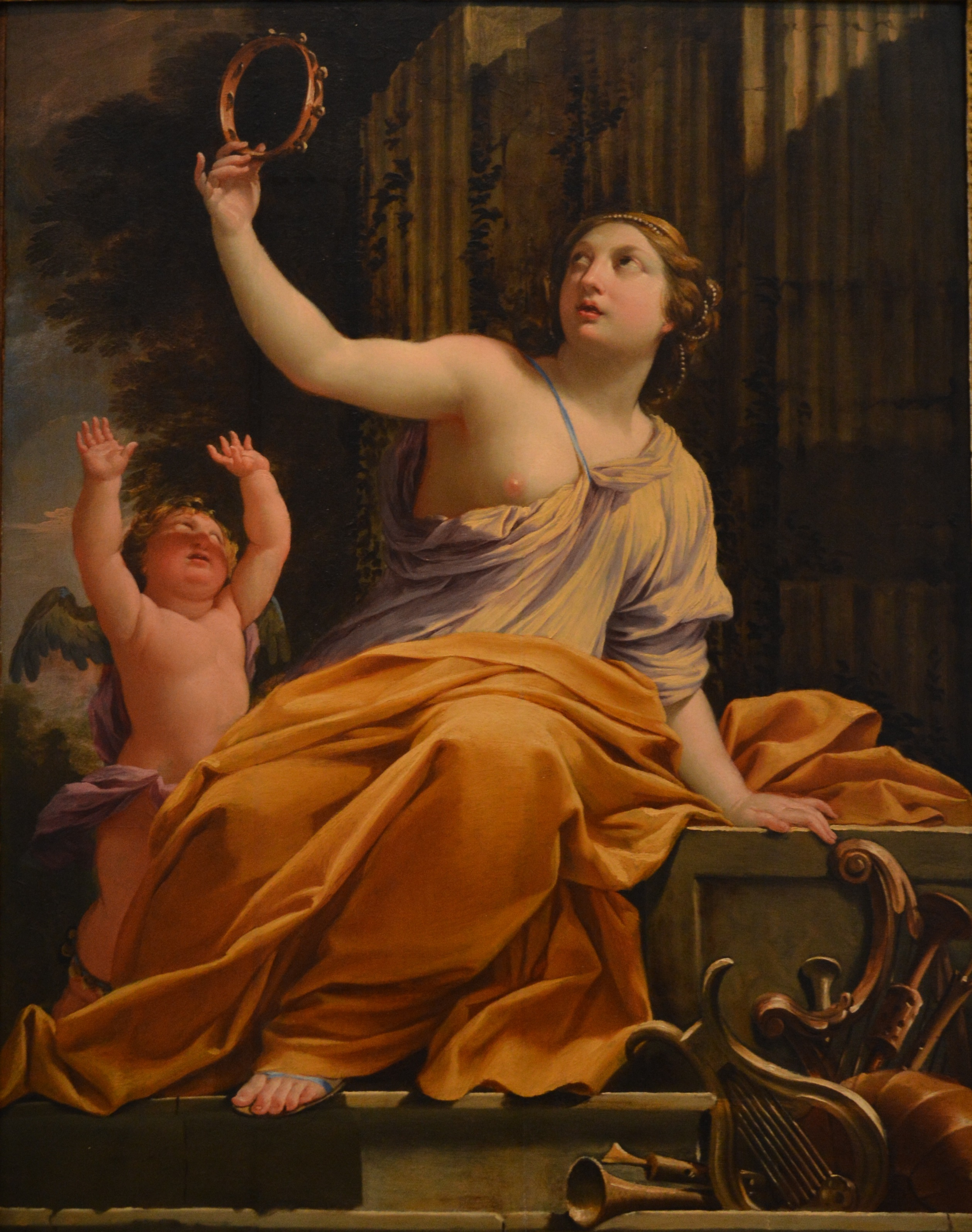 Painel em carvalho